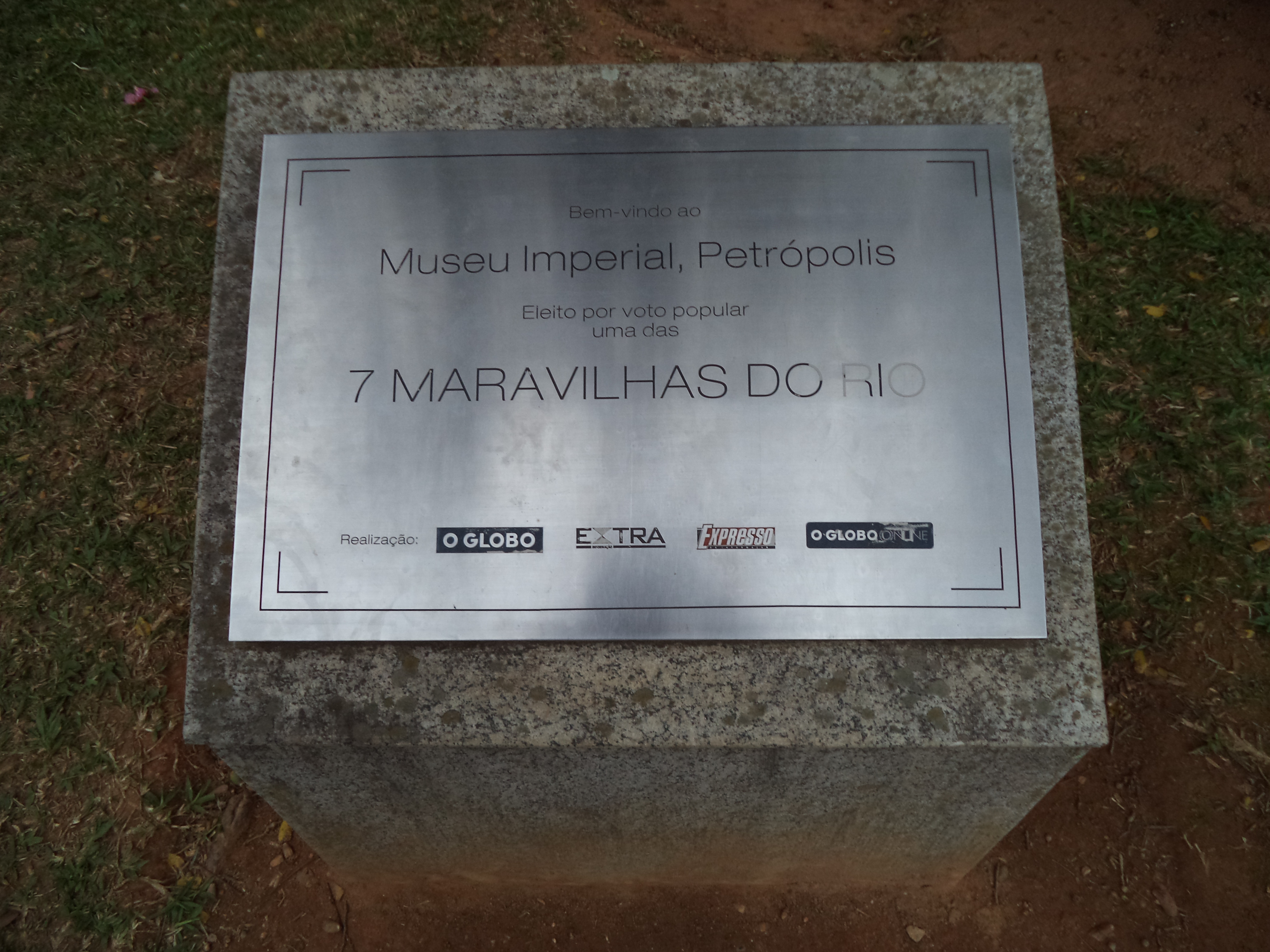 Placa no Museu Imperial, em Petrópolis.